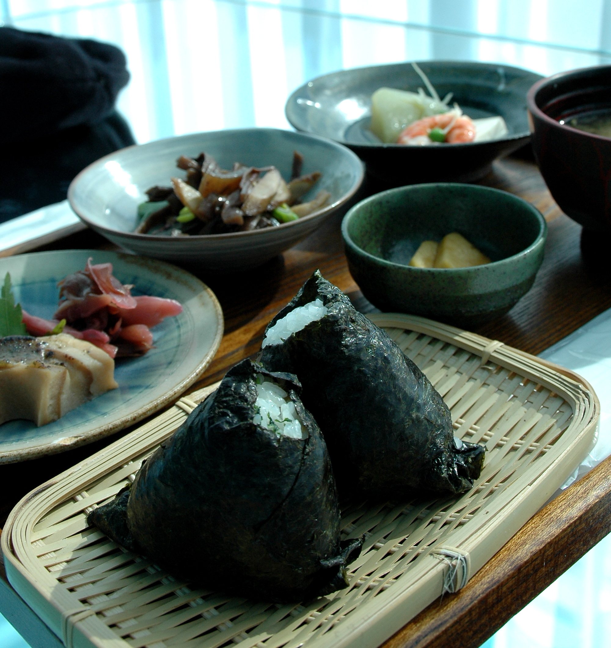 新潟ということで、米を。